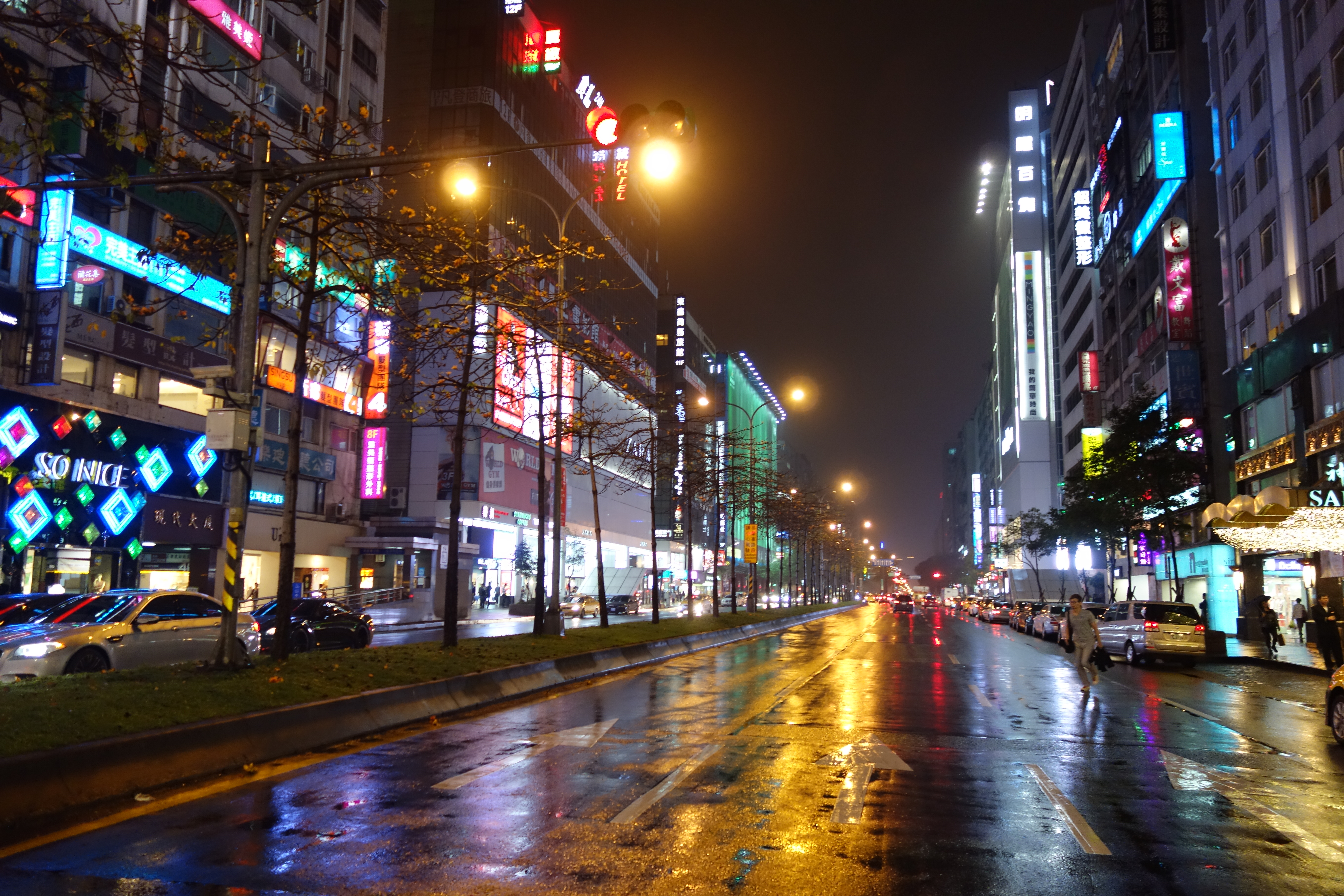 忠孝敦化駅上の忠孝東路